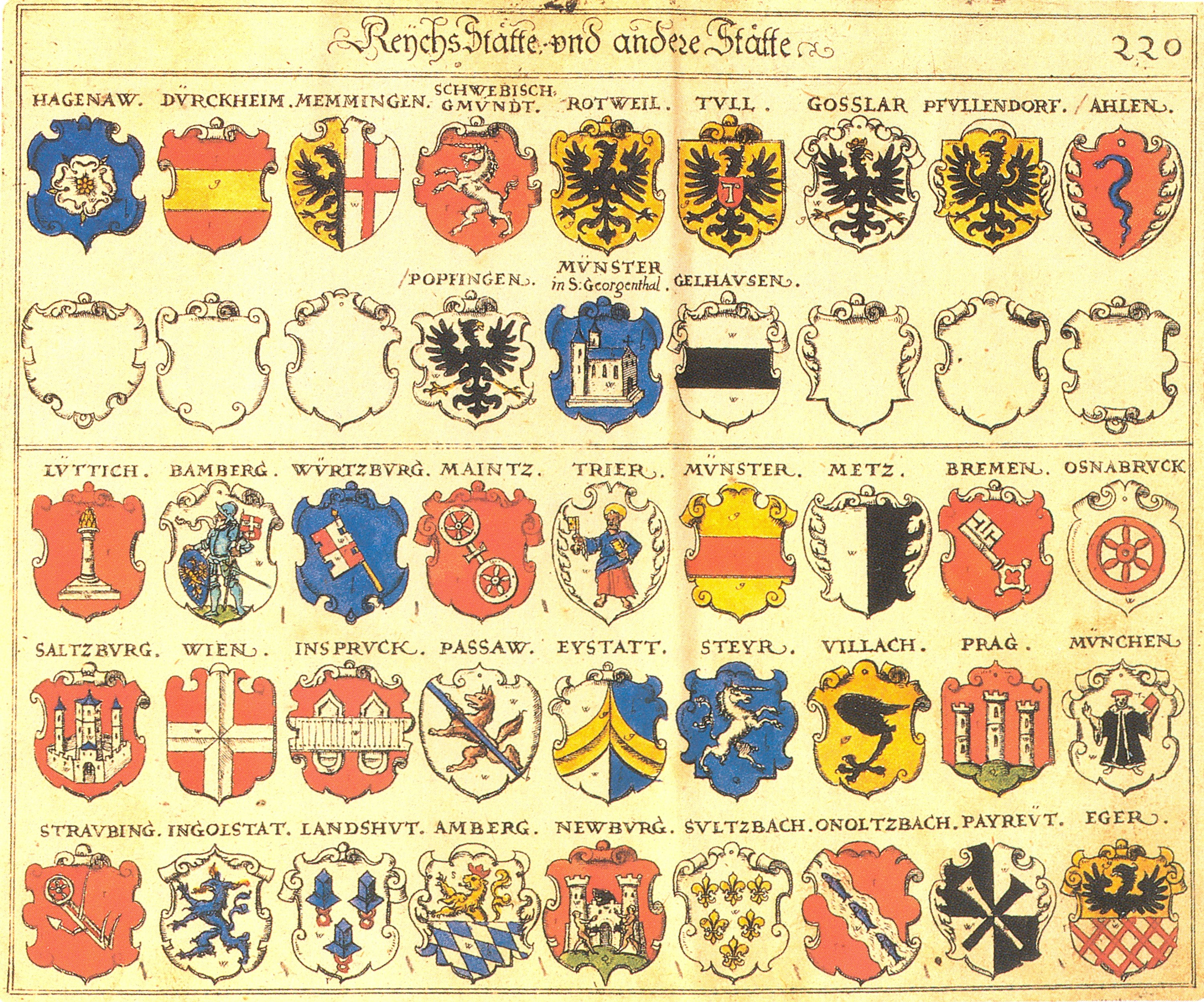 Johann Siebmacher: New Wappenbuch eingescannt aus: Horst Appuhn (Hrsg.), Johann Siebmachers Wappenbuch. Die bibliophilen Taschenbücher 538, 2. verb. Aufl , Dortmund 1989. Reichsstädte und andere Städte Blatt 220